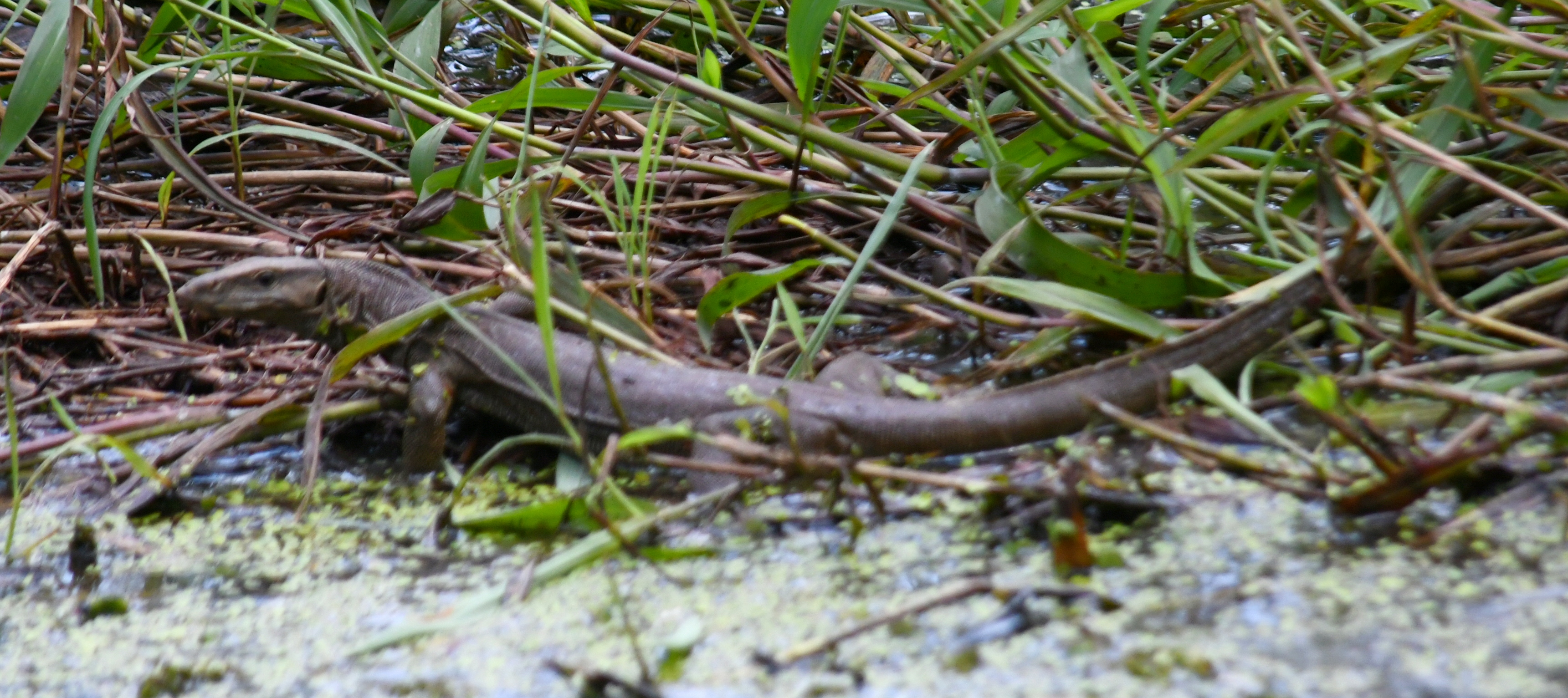 ചതുപ്പ് സ്ഥലങ്ങളില്‍ സാധാരണയായി കാണുന്ന ഒരു ഉരഗമാണ് ഉടുമ്പ്